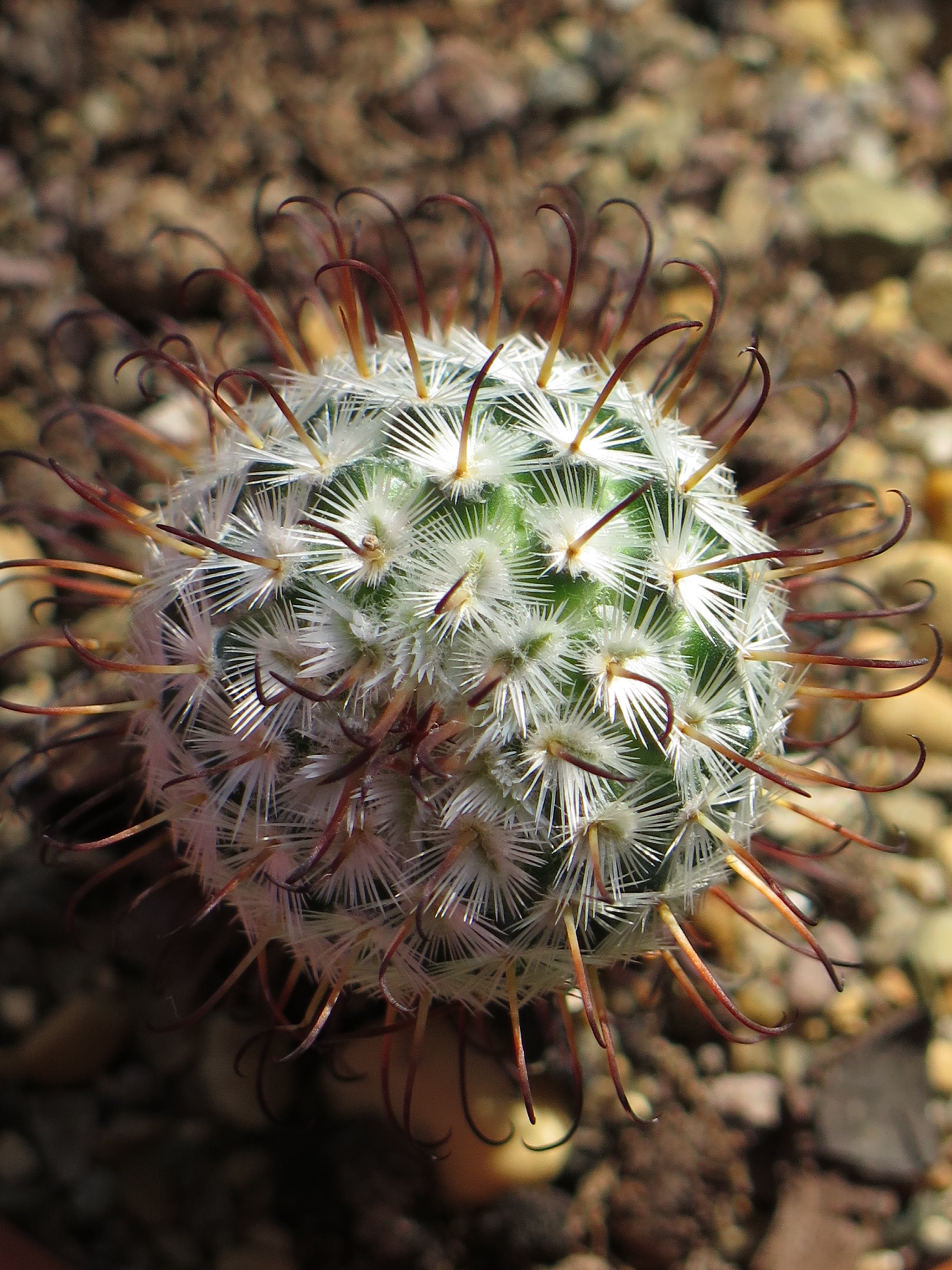 La mammillaria perezdelarosae vista dall'alto